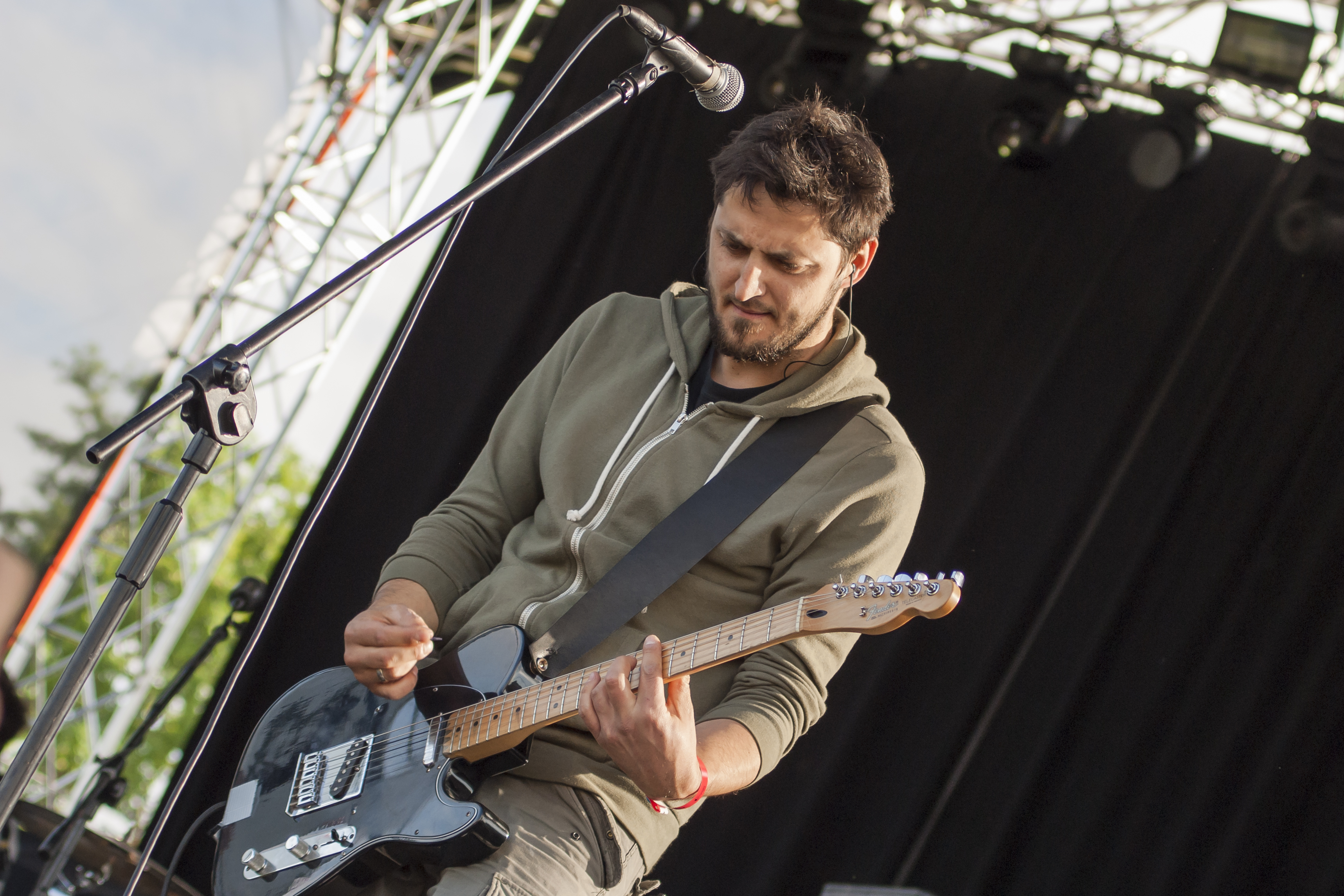 Jacek „Czepek” Czepułkowski z zespołu Koniec Świata na Festiwalu Ursynalia 2014